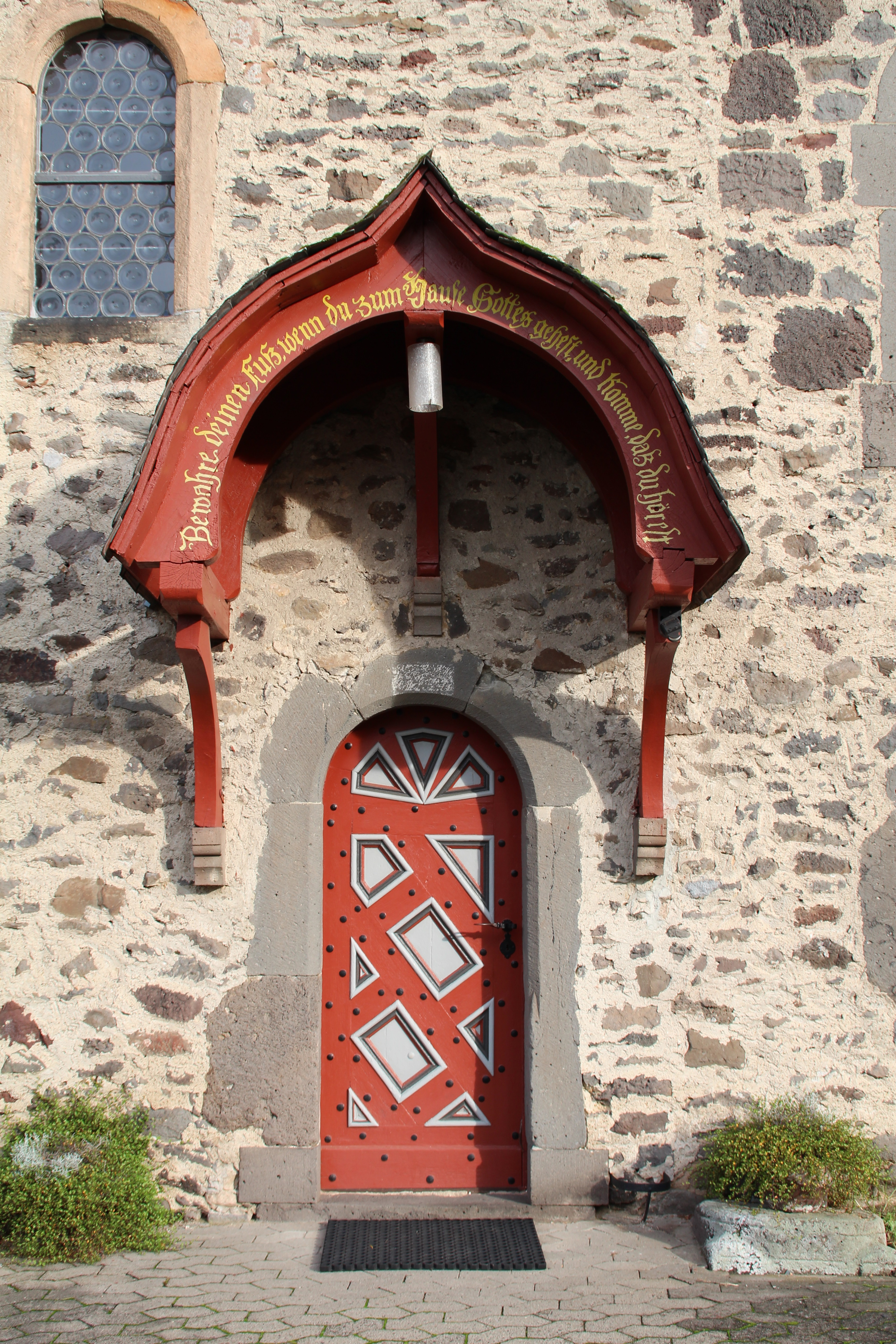 Orgel der Ev. Kirche Winnen, Allendorf/Lumda, Landkreis Gießen, Hessen, Deutschland